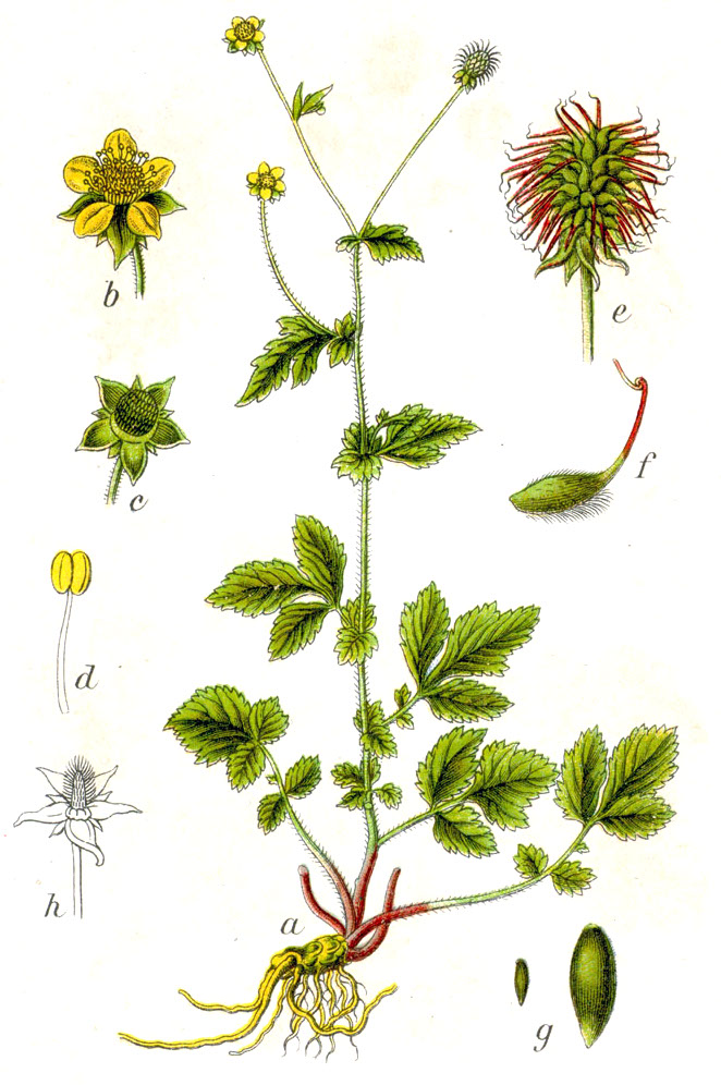 Geum urbanum L. Original Caption Echte Nelkenwurz, Geum urbanum